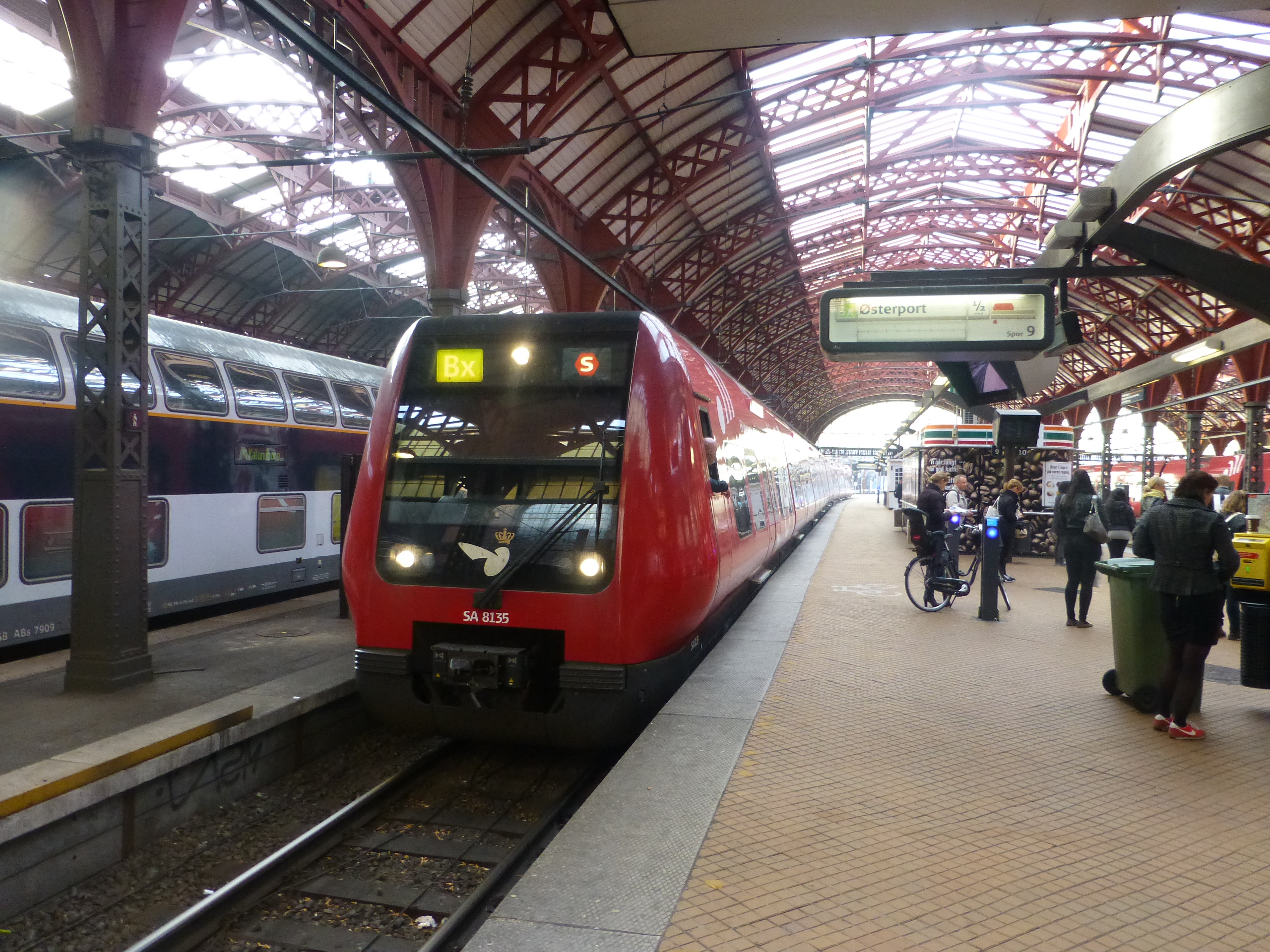 Line Bx on Københavns Hovedbanegård (Copenhagen Central Station).